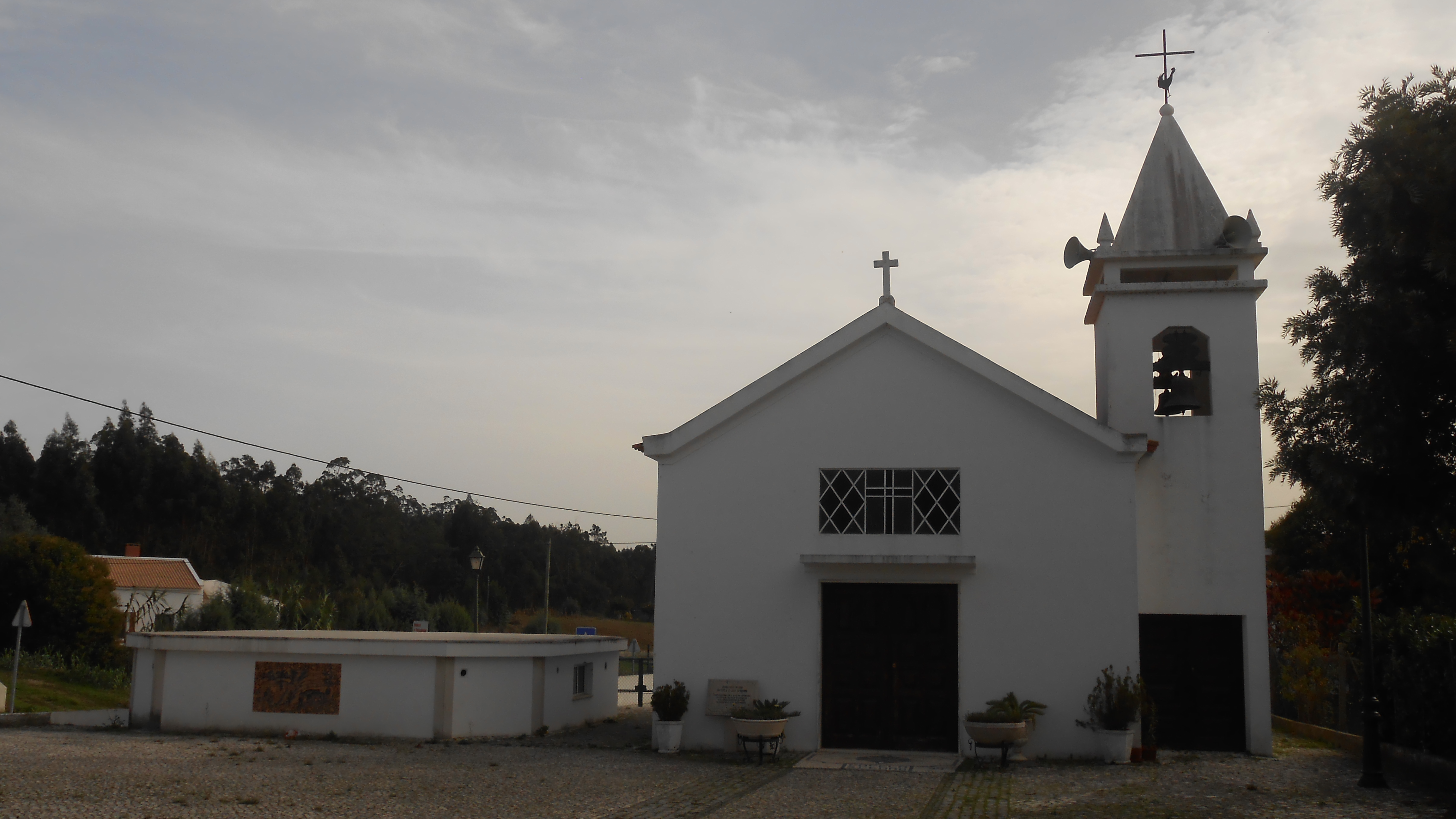 Igreja do Casal do Redinho.